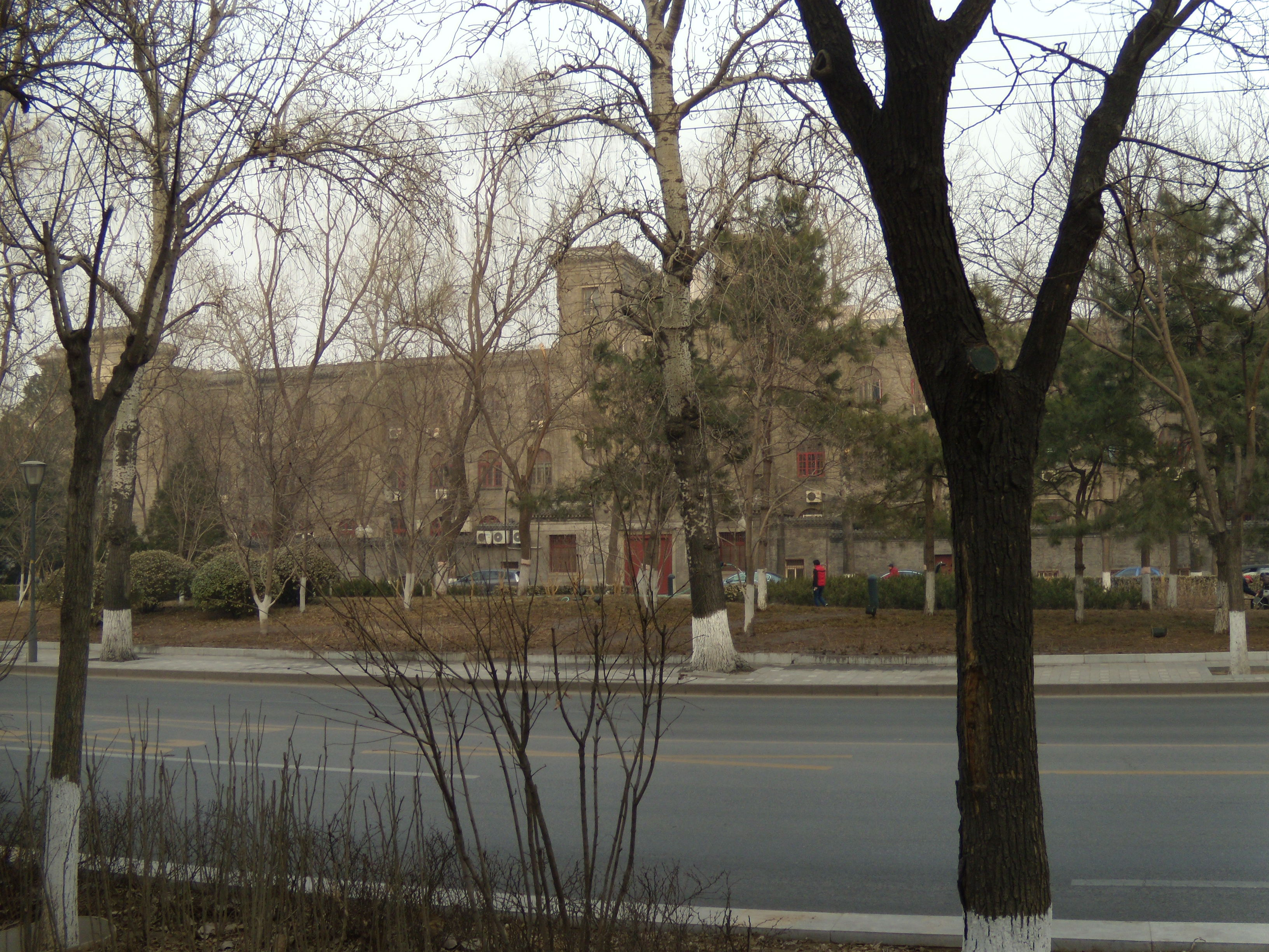 北京中法大学